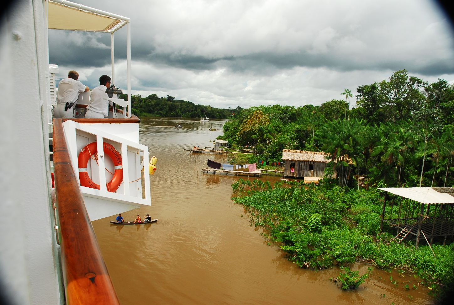 m/s "Explorer' navigates carefully